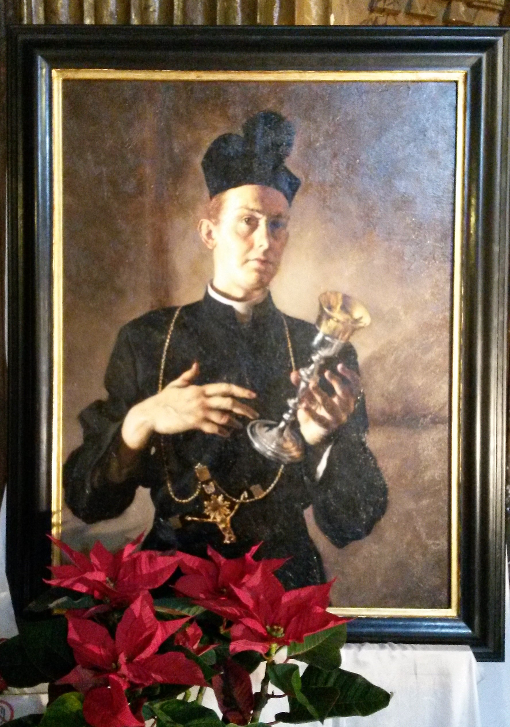 Un religioso de los Misioneros de la Preciosísima Sangre. En la Iglesia de Santa Maria in Trivio, Roma - Italia.